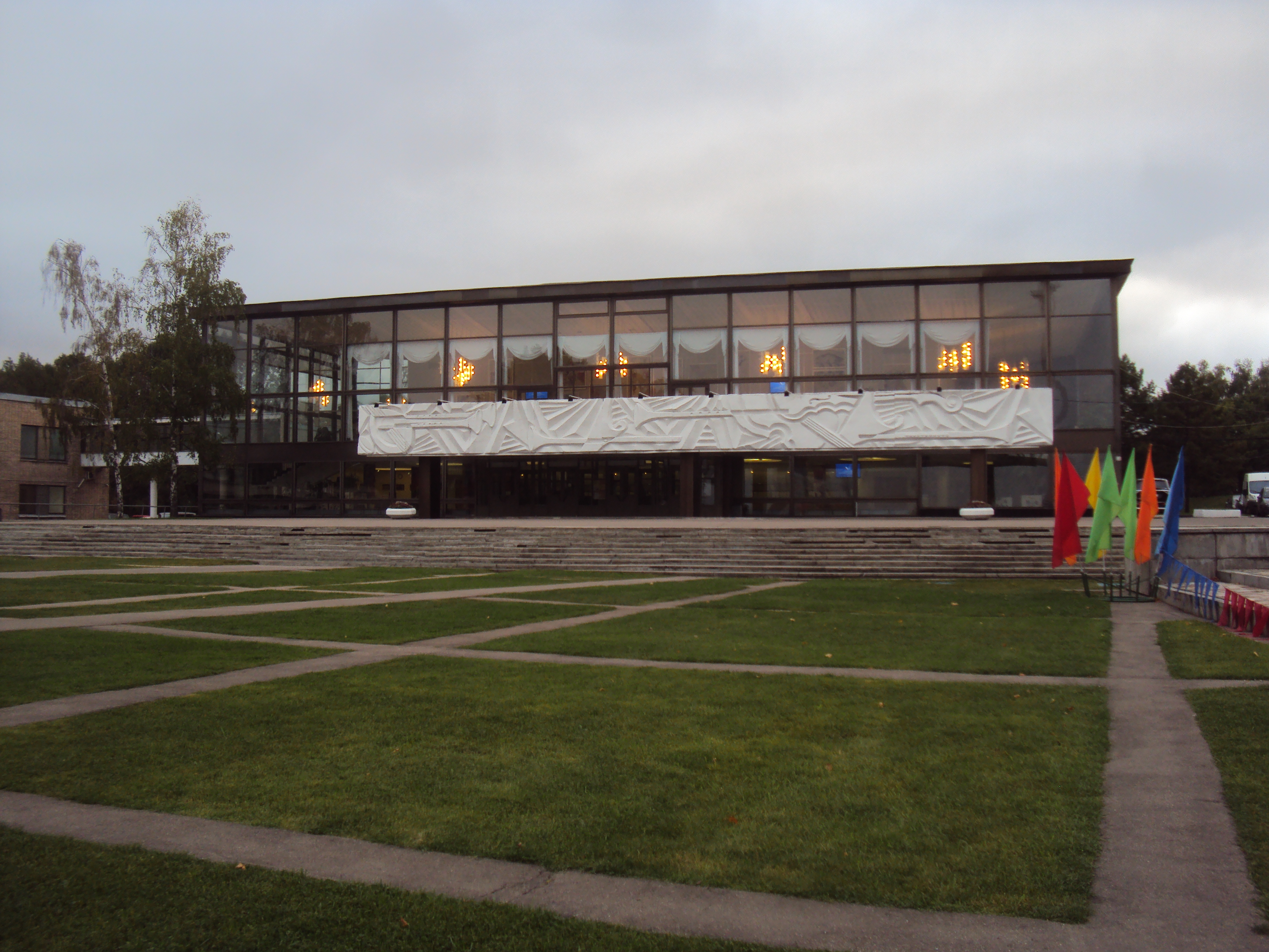 Концертный зал с декоративным рельефом «Музыка» на козырьке парадного входа и панно «Пионерская геральдика» на двух парковых фасадах (сценической коробки): Косыгина ул., дом 17, корпус 7, Гагаринский, Юго-Западный округ, Москва